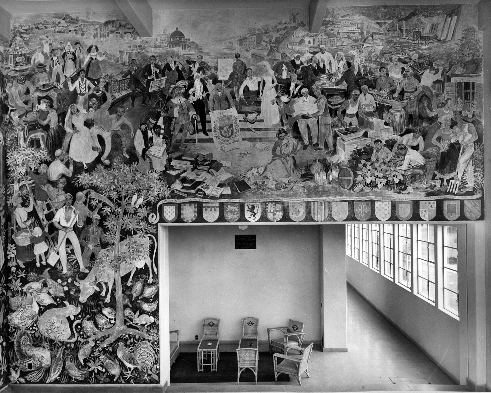 Lycée Franco-Mexicain